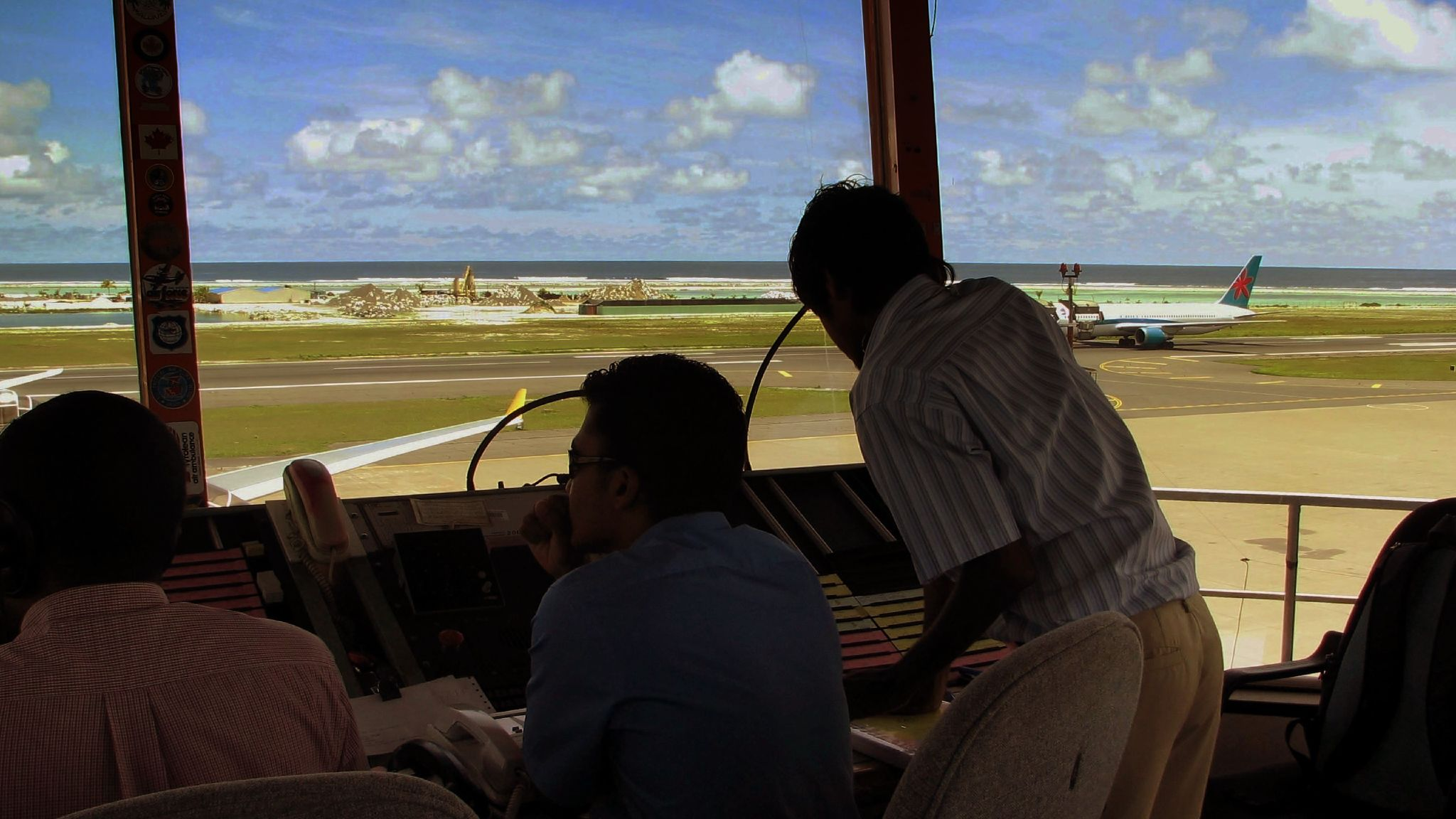 Tower